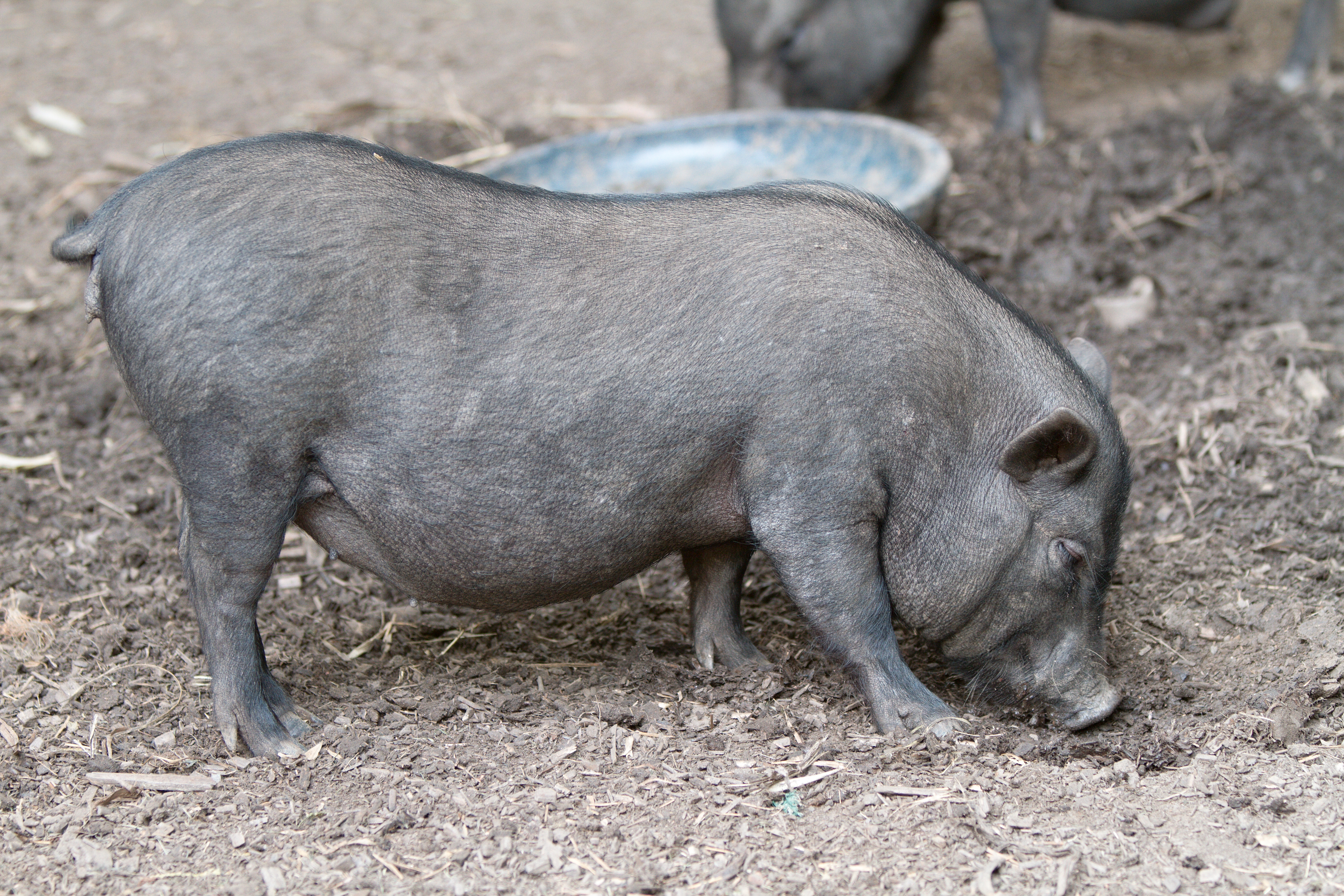 Cochon asiatique à la bambouseraie de Prafrance (Gard, France).